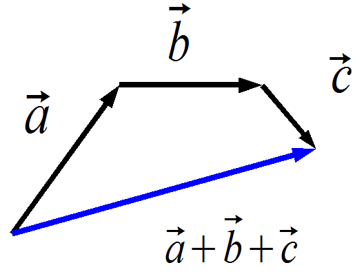 Som meerdere vectoren